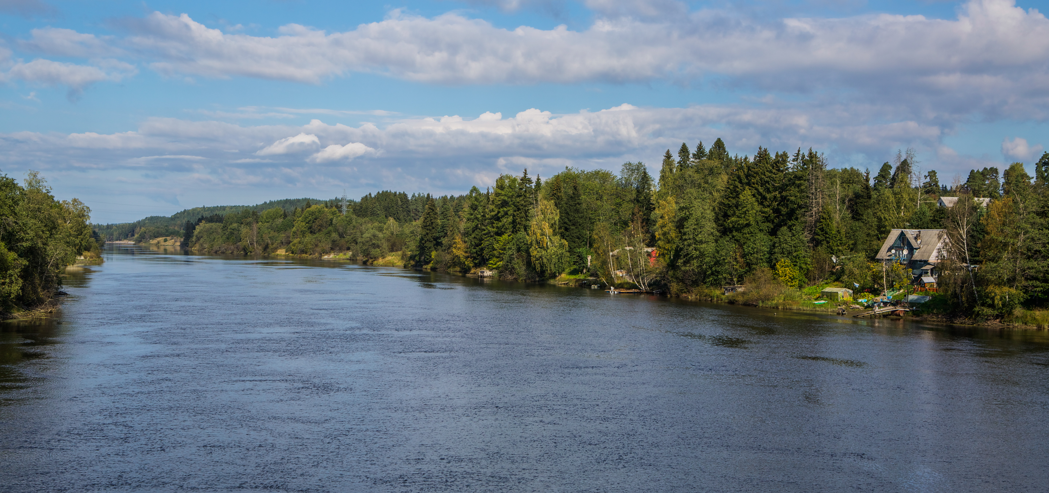 Vuoksi, Lesogorski, Karjalankannas